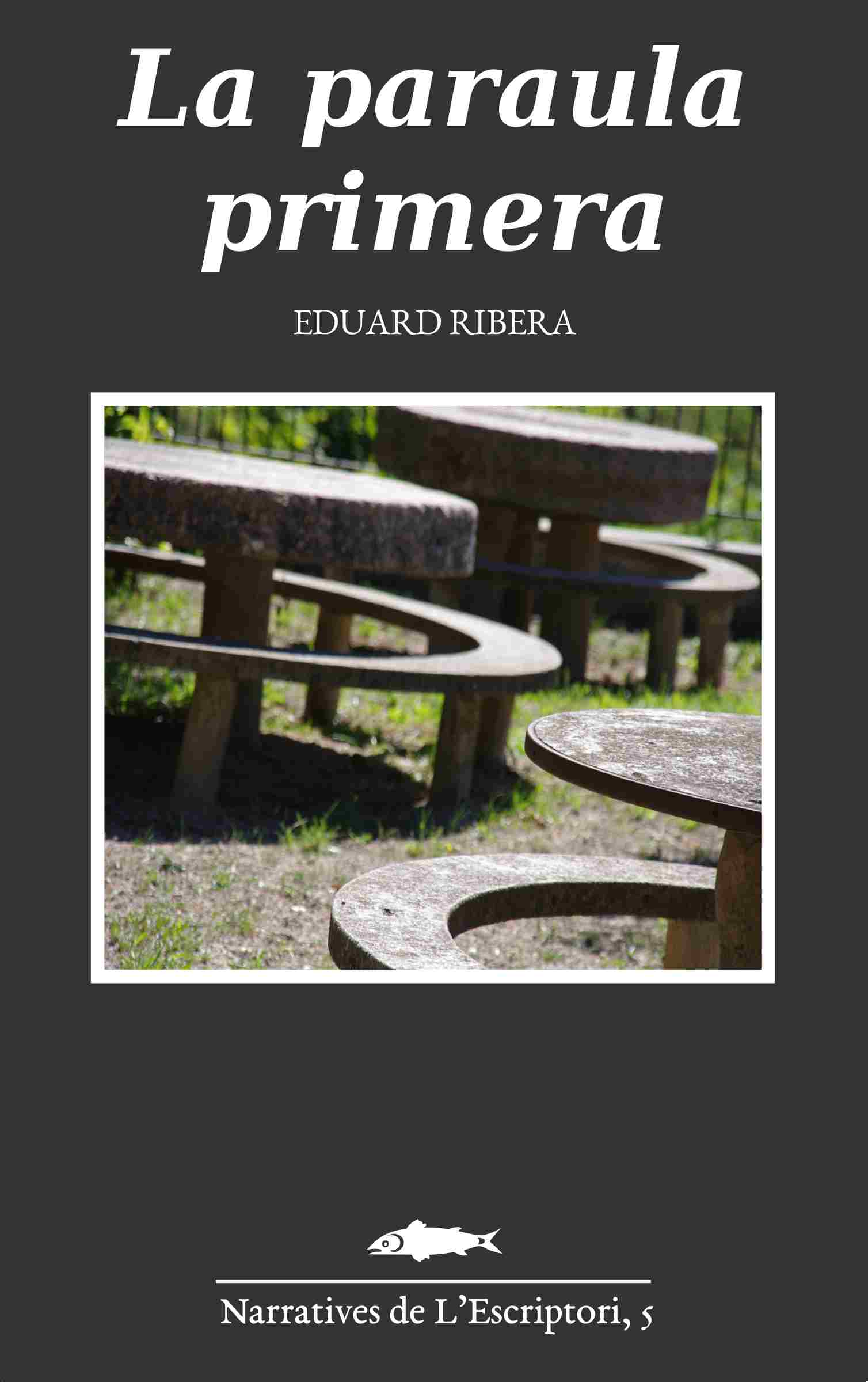 Coberta del llibre "La paraula primera" (2017) d'Eduard Ribera